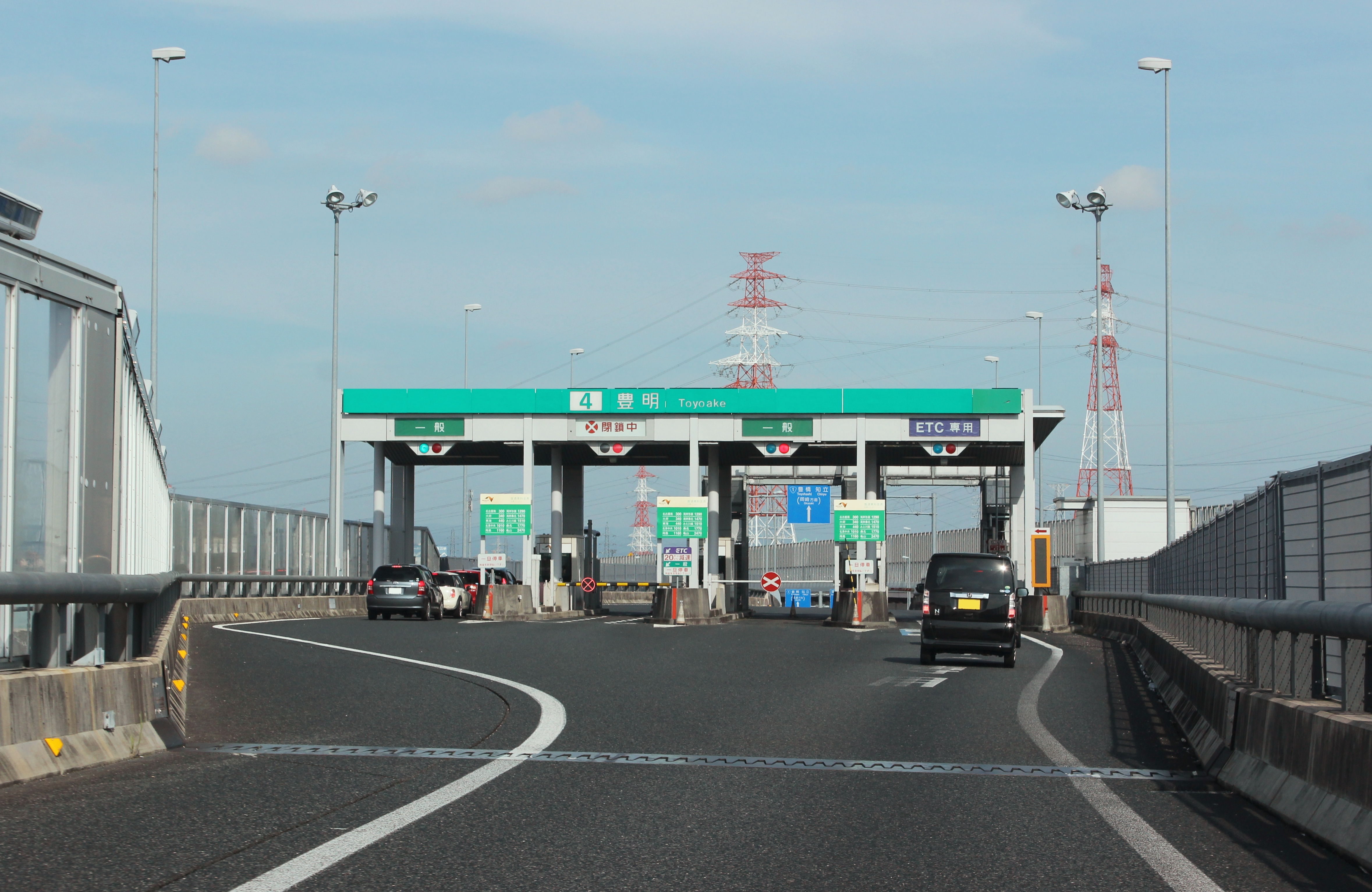 伊勢湾岸自動車道 豊明IC出口料金所